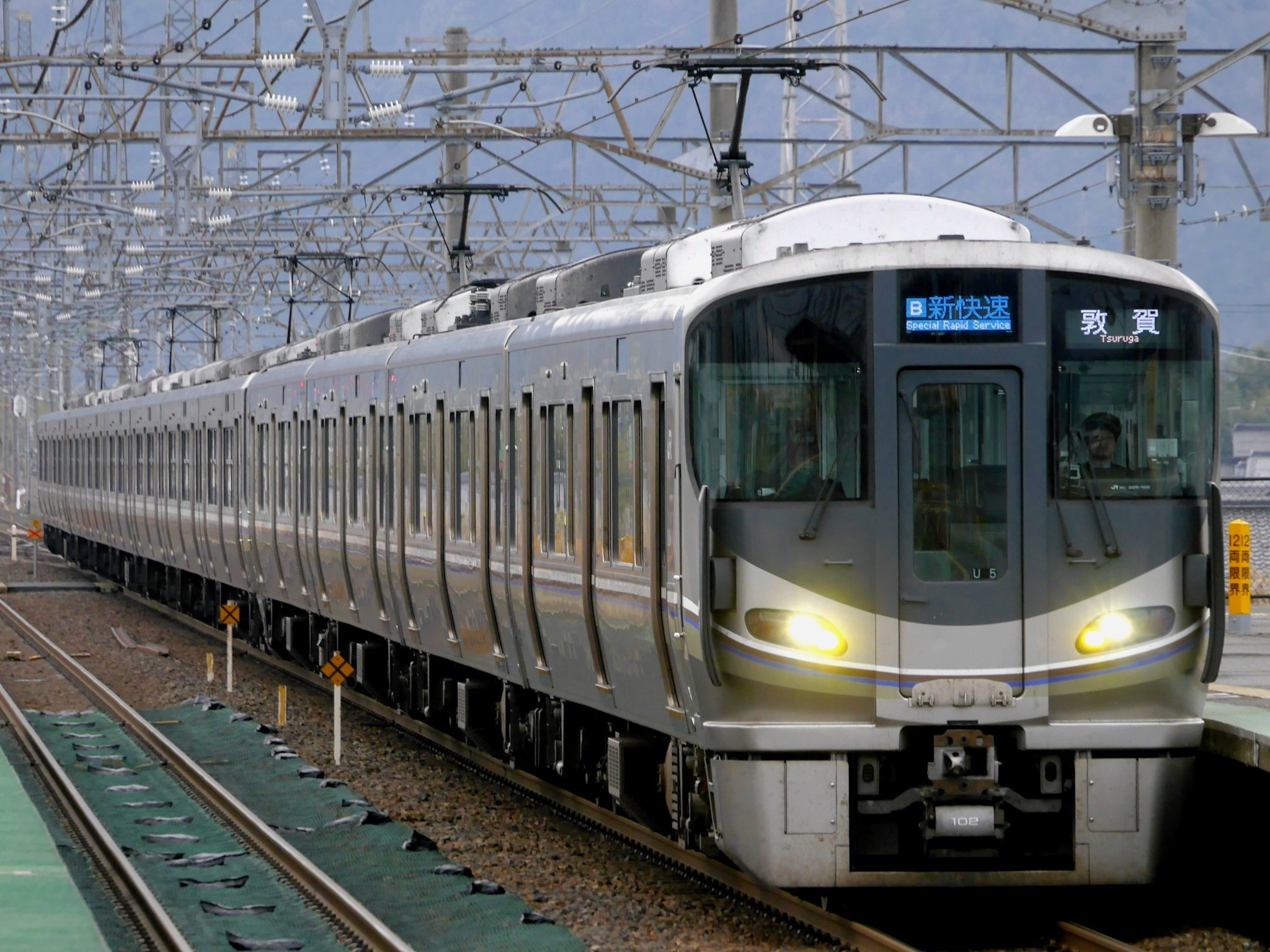 JR西日本225系100番台U5編成 JR湖西線近江今津駅